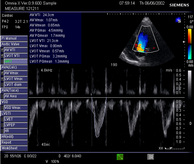 VTI im LVOT (US)